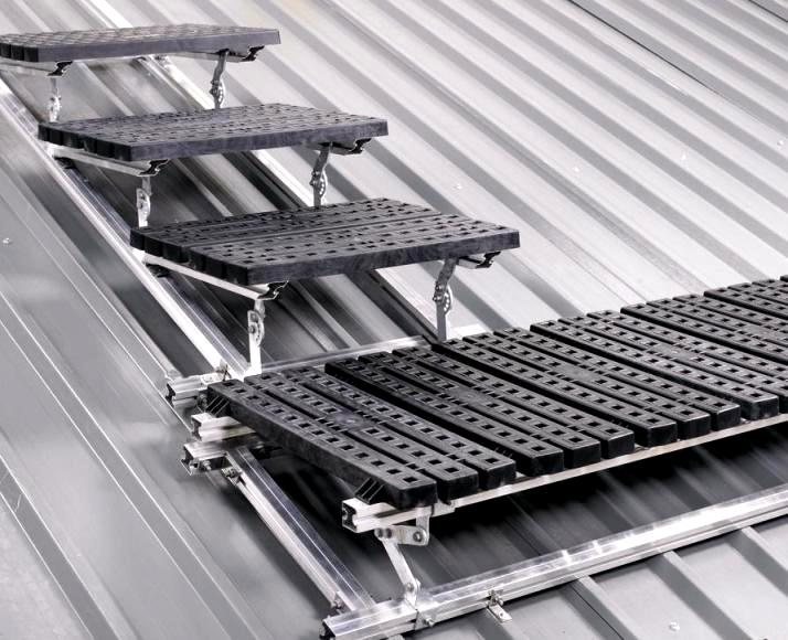 Caillebotis chemin de circulation KeeWalk proposé par la societe KeeSafety SAS au 30 boulevard PAsteur 75015 Paris